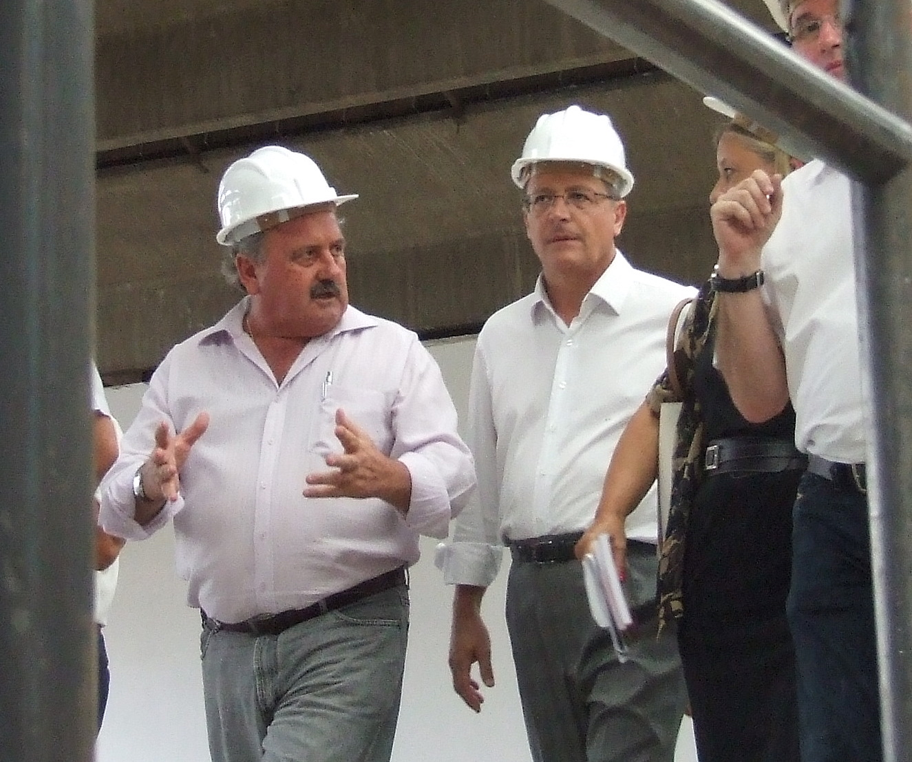 Braz e Alckmin conversam durante vistria de uma obra da Etec de Osasco